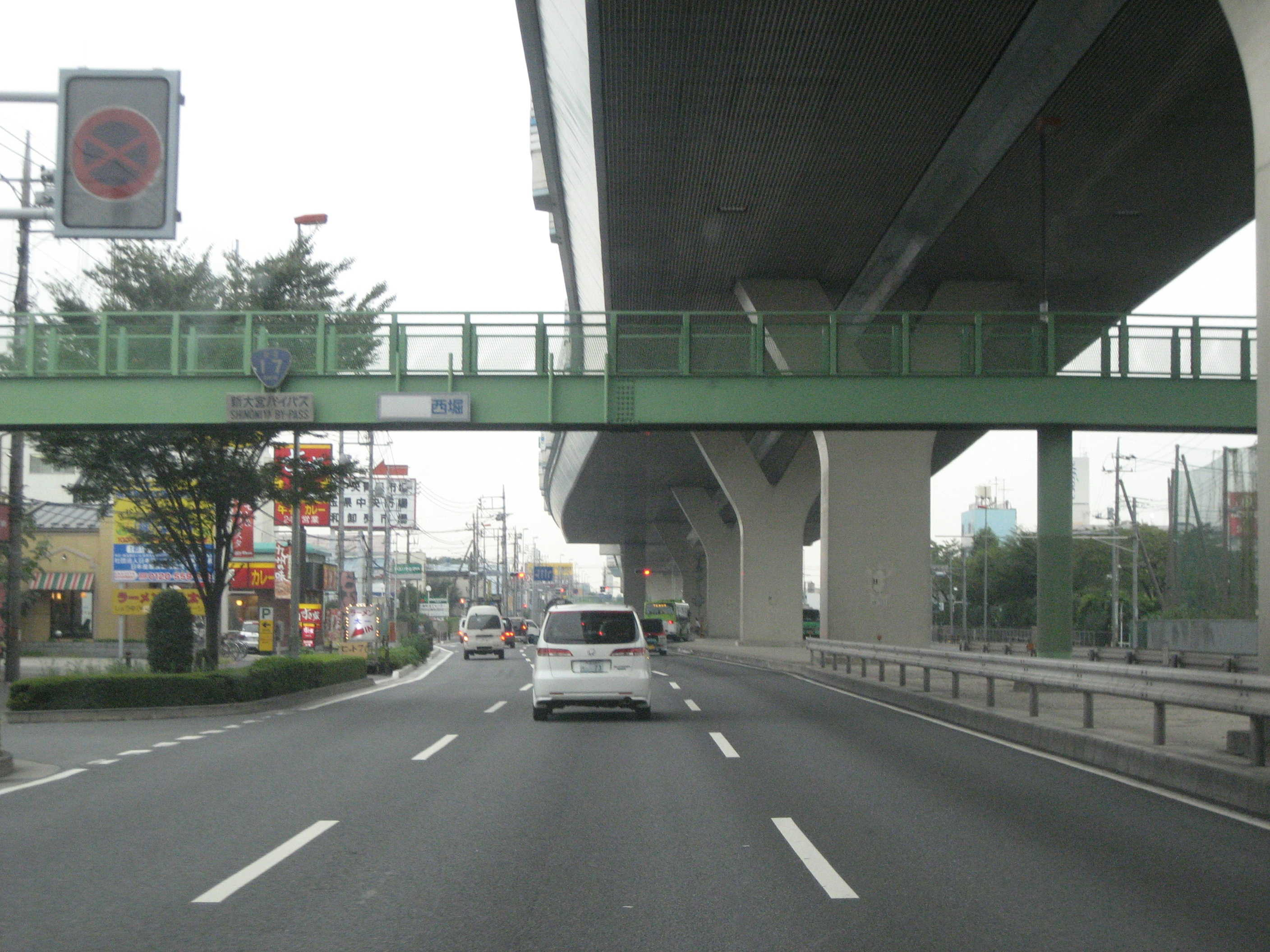 新大宮バイパス桜区内